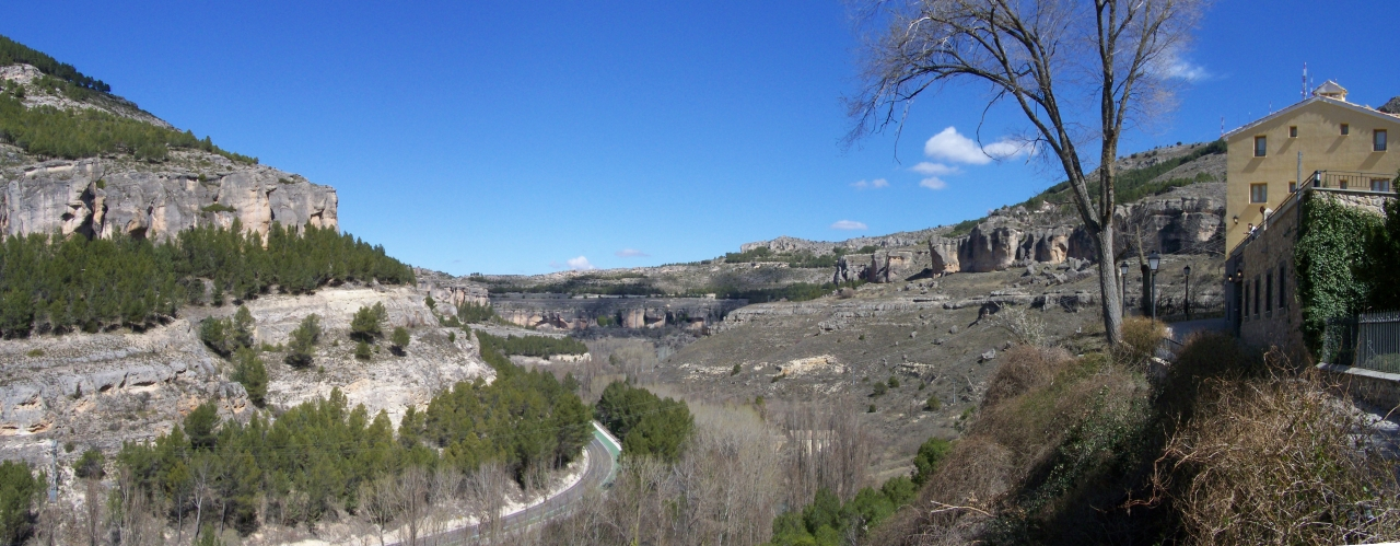 Hoz del río Júcar / Panorámica utilizando Autopano y Hugin